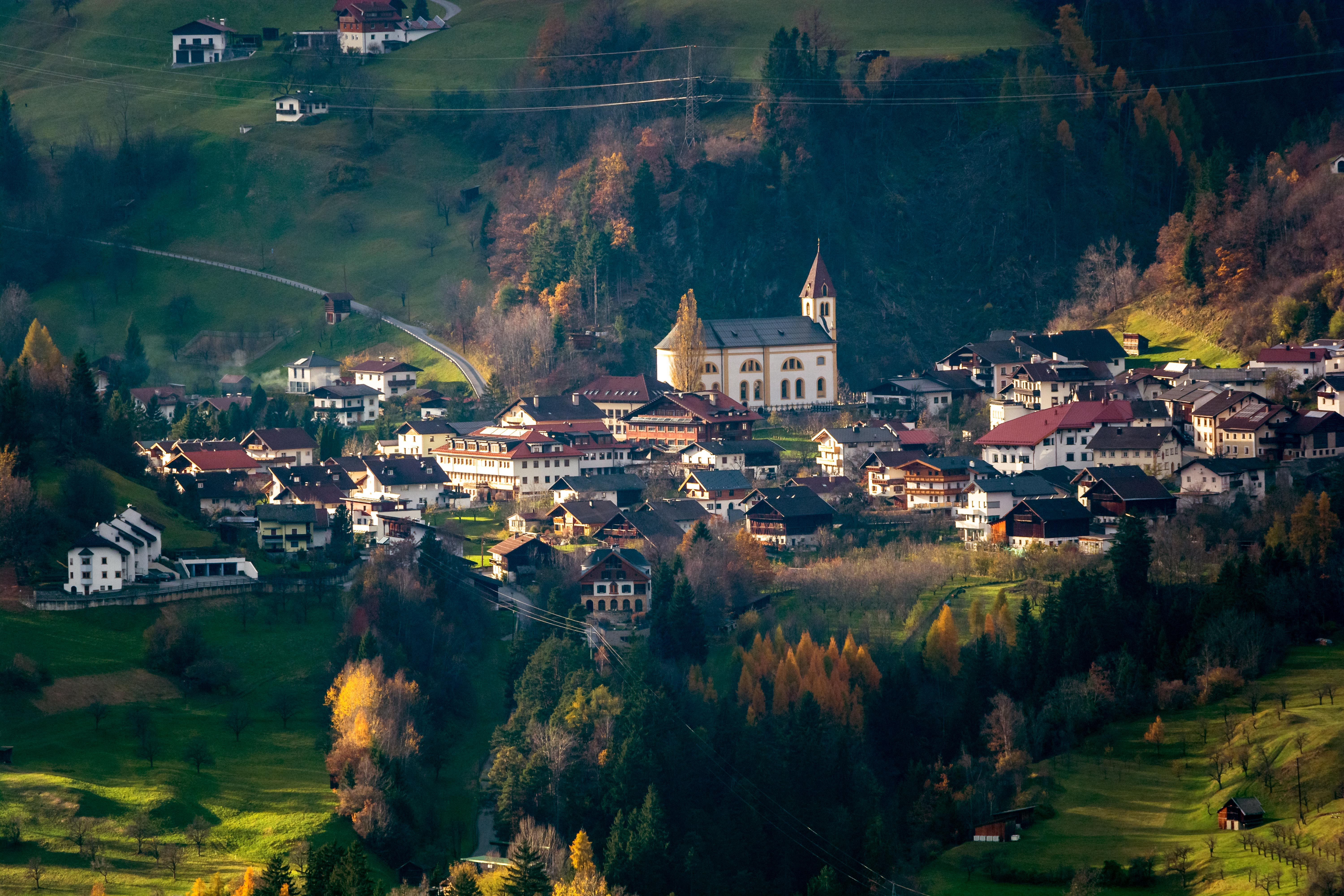 Grins bei Landeck